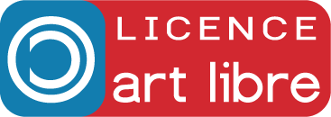 FAL button